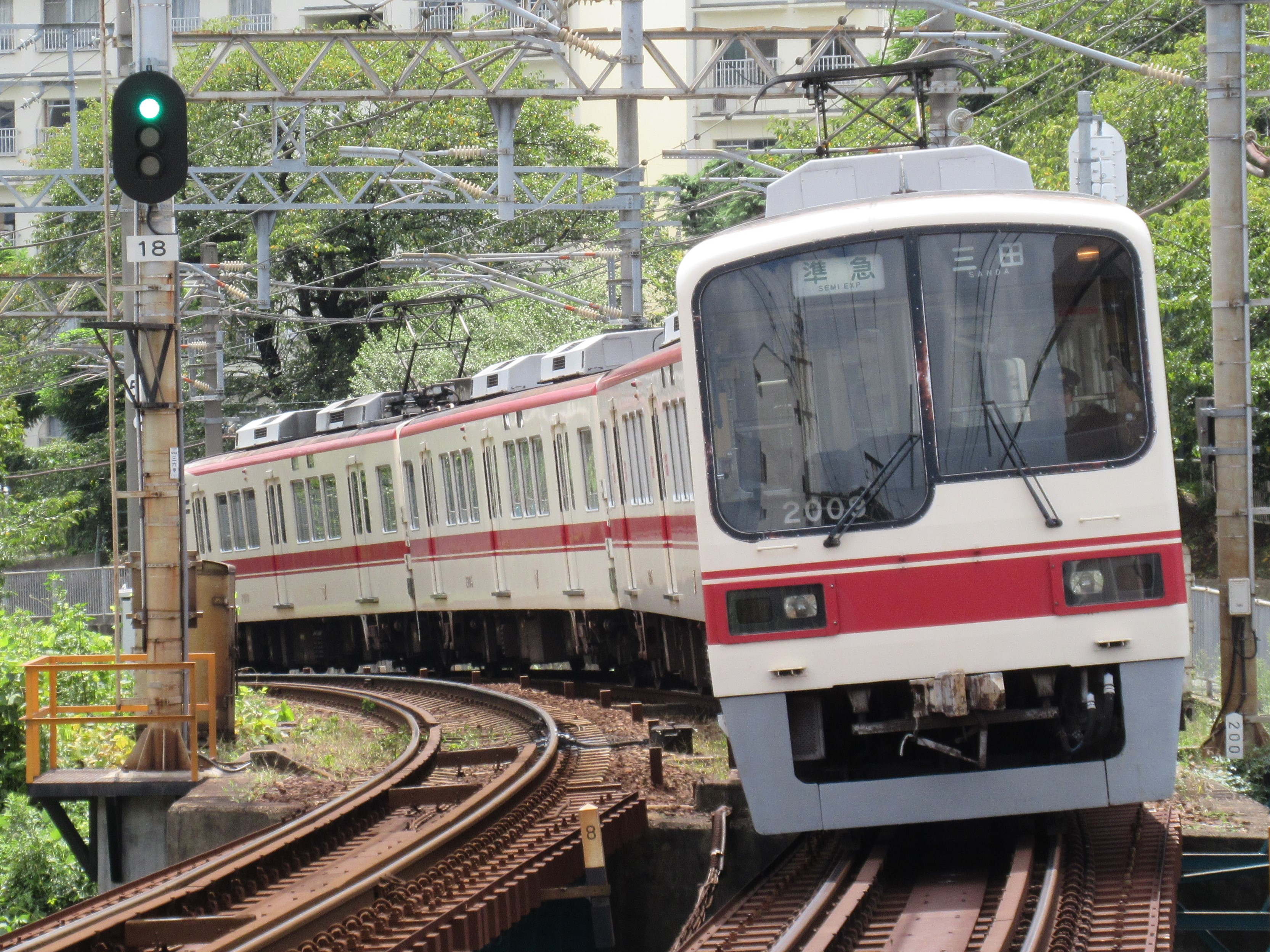 神戸電鉄2009 (長田駅にて)